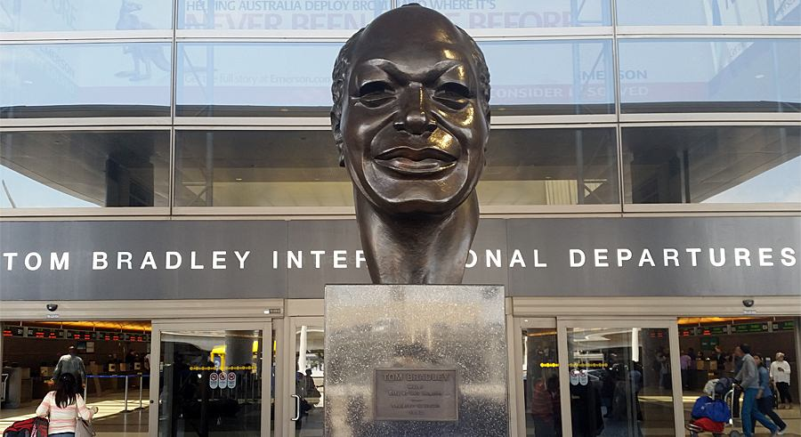 Tom Bradley, Büste am gleichnamigen Terminal am Flughafen von Los Angeles